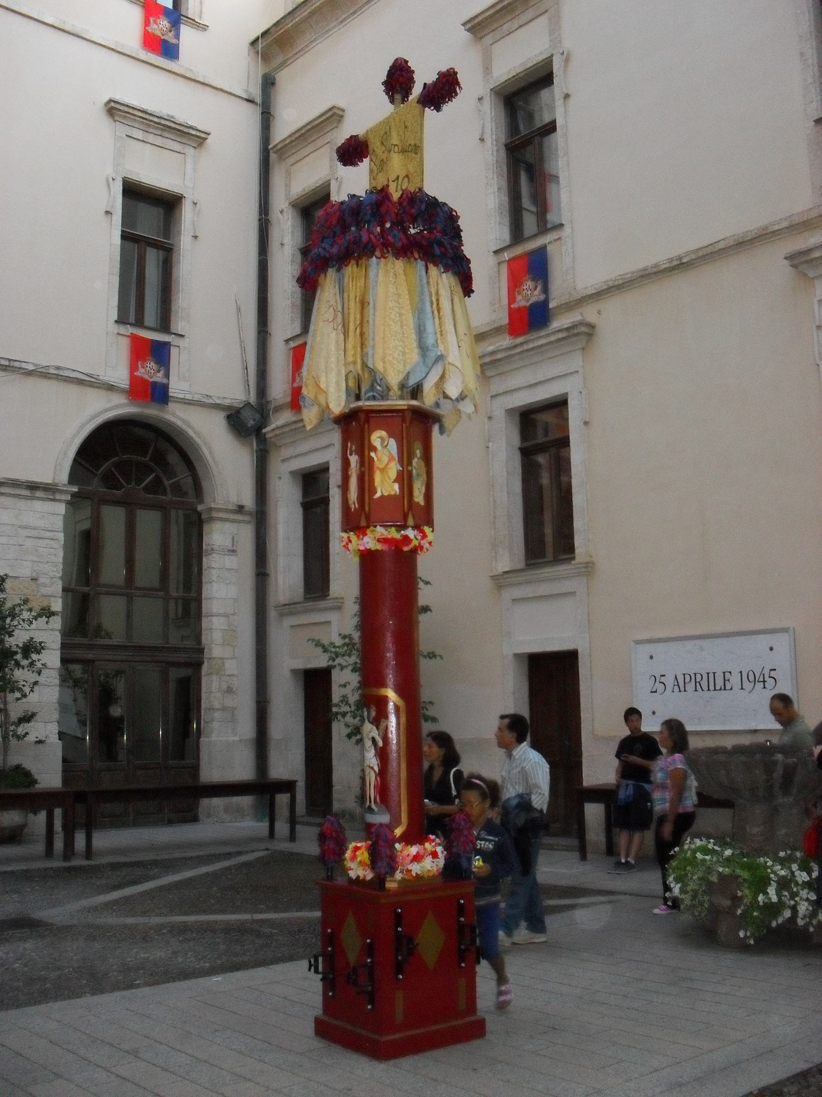 Il candeliere dei detenuti di San Sebastiano di Sassari nel 2010